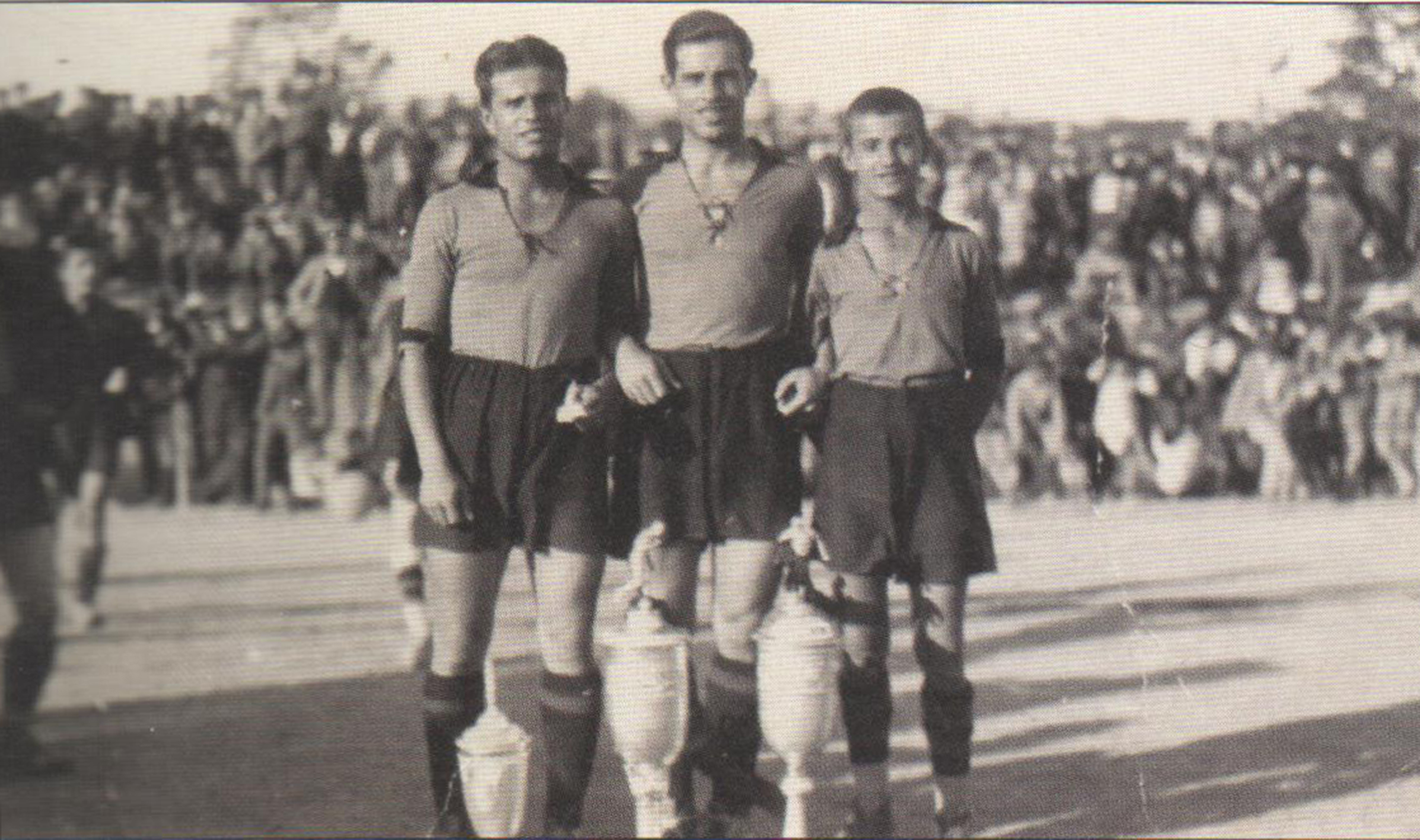 Τα αδέρφια Νικηφόρος, Κώστας και Κλεάνθης Βικελίδης στις 5 Οκτωβρίου 1930 ημερομηνία έναρξης του πρωταθλήματος της περιόδου 1930-31 με τα κύπελλα της προηγούμενης περιόδου